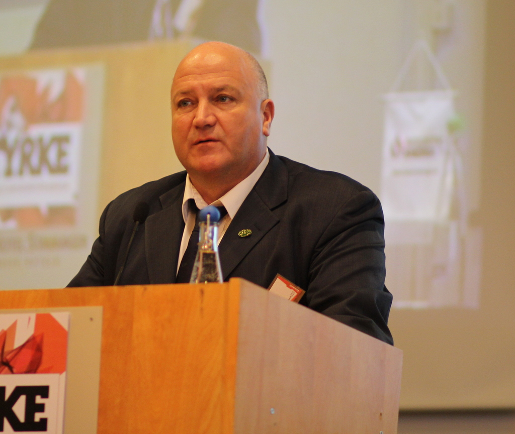 Bob Crow- Britisk fagforeningsleder